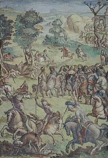 Leggenda del re rachis